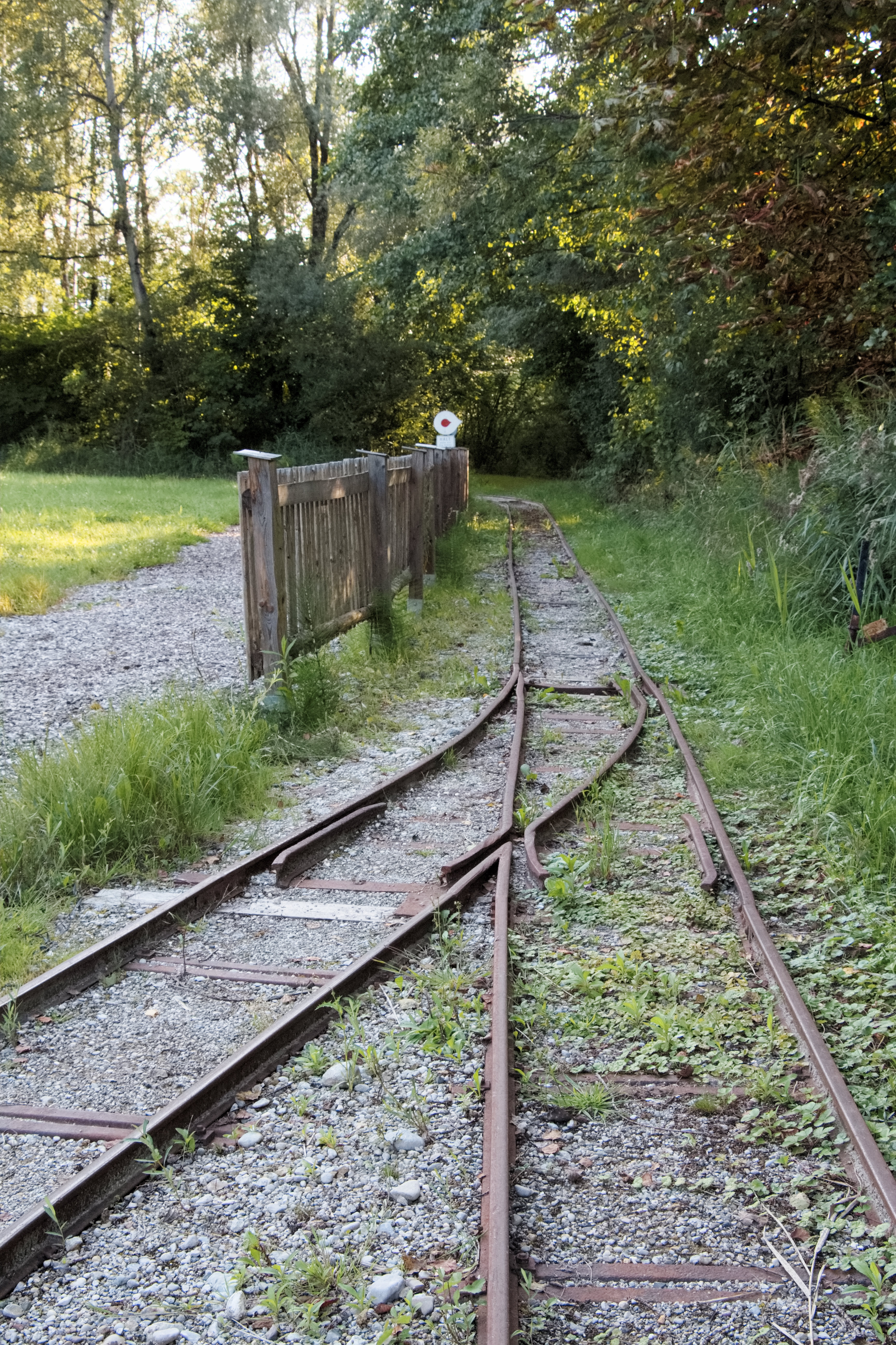 Bürmoos (Bezirk Salzburg-Umgebung): zu touristischen Zwecken wiedererrichtetes Gleis für Fahrten mit Wagen der ehemaligen Feldbahn (Bockerlbahn) im Bürmooser Moor